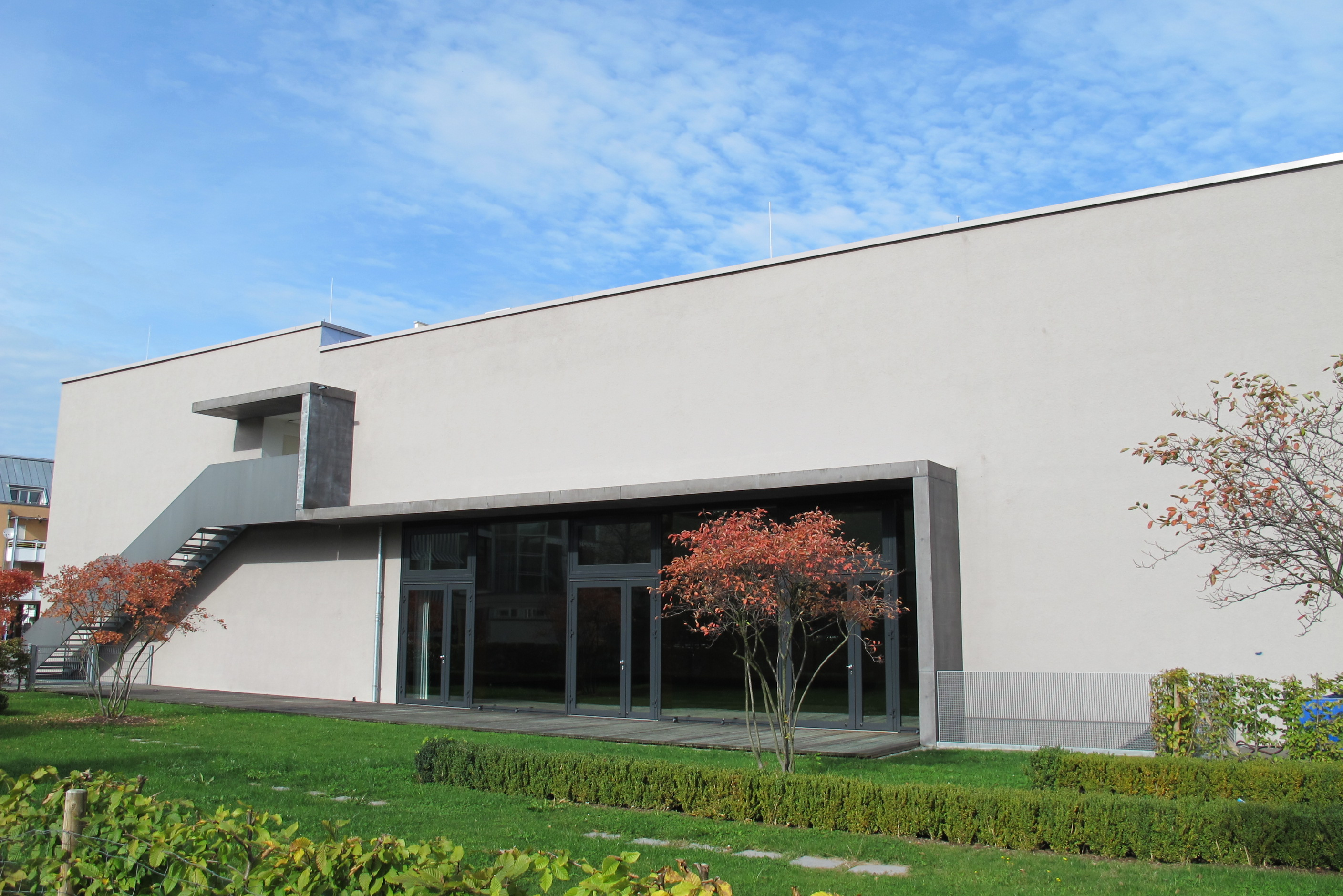 Der Treffpunkt Stadtmitte hat eine attraktive Außenfläche